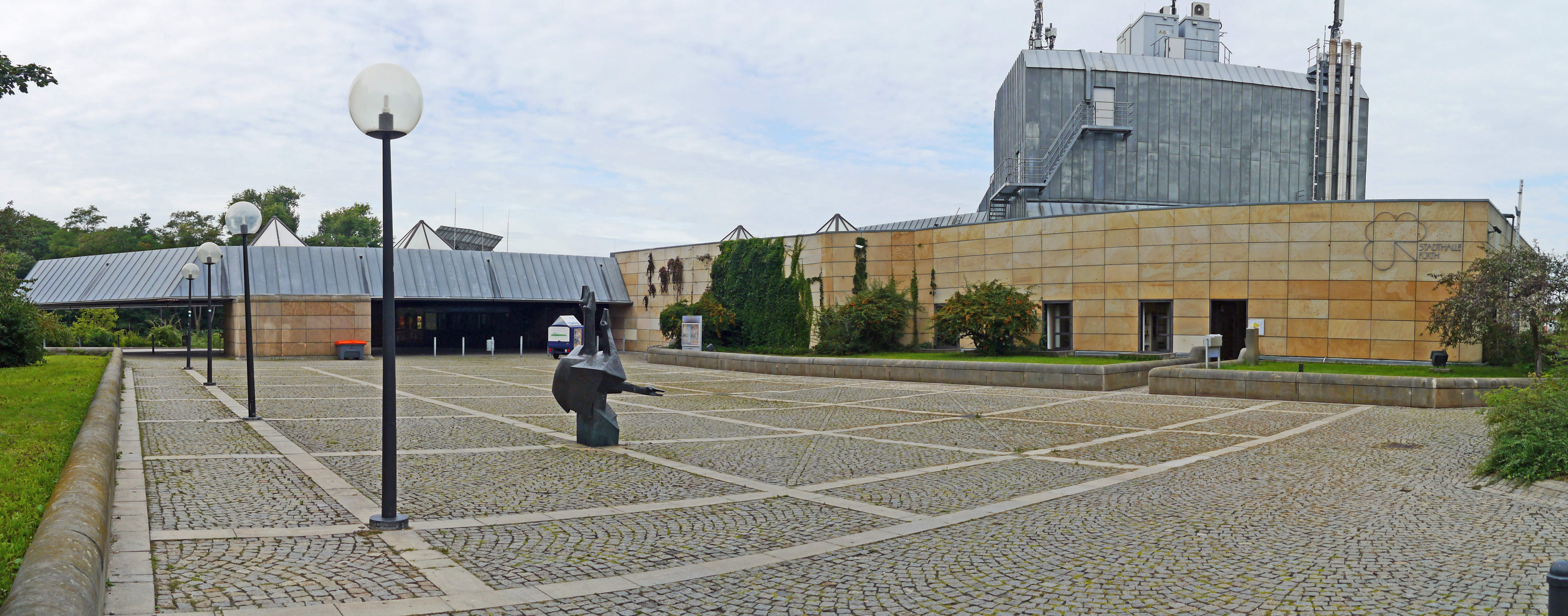 Die Stadthalle Fürth, 2014 von der Vorderseite.